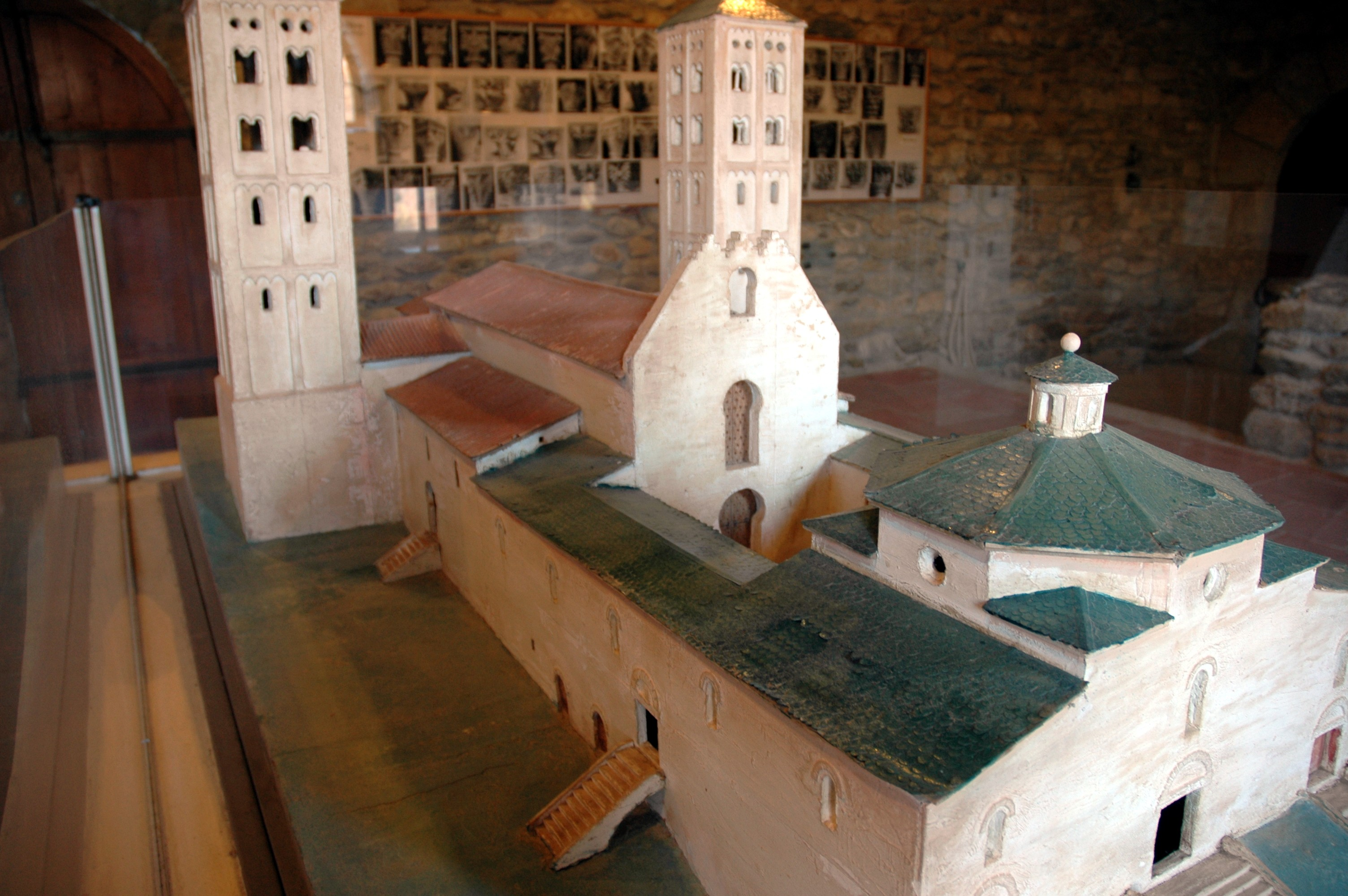 Sant Miquel de Cuixà - 1040